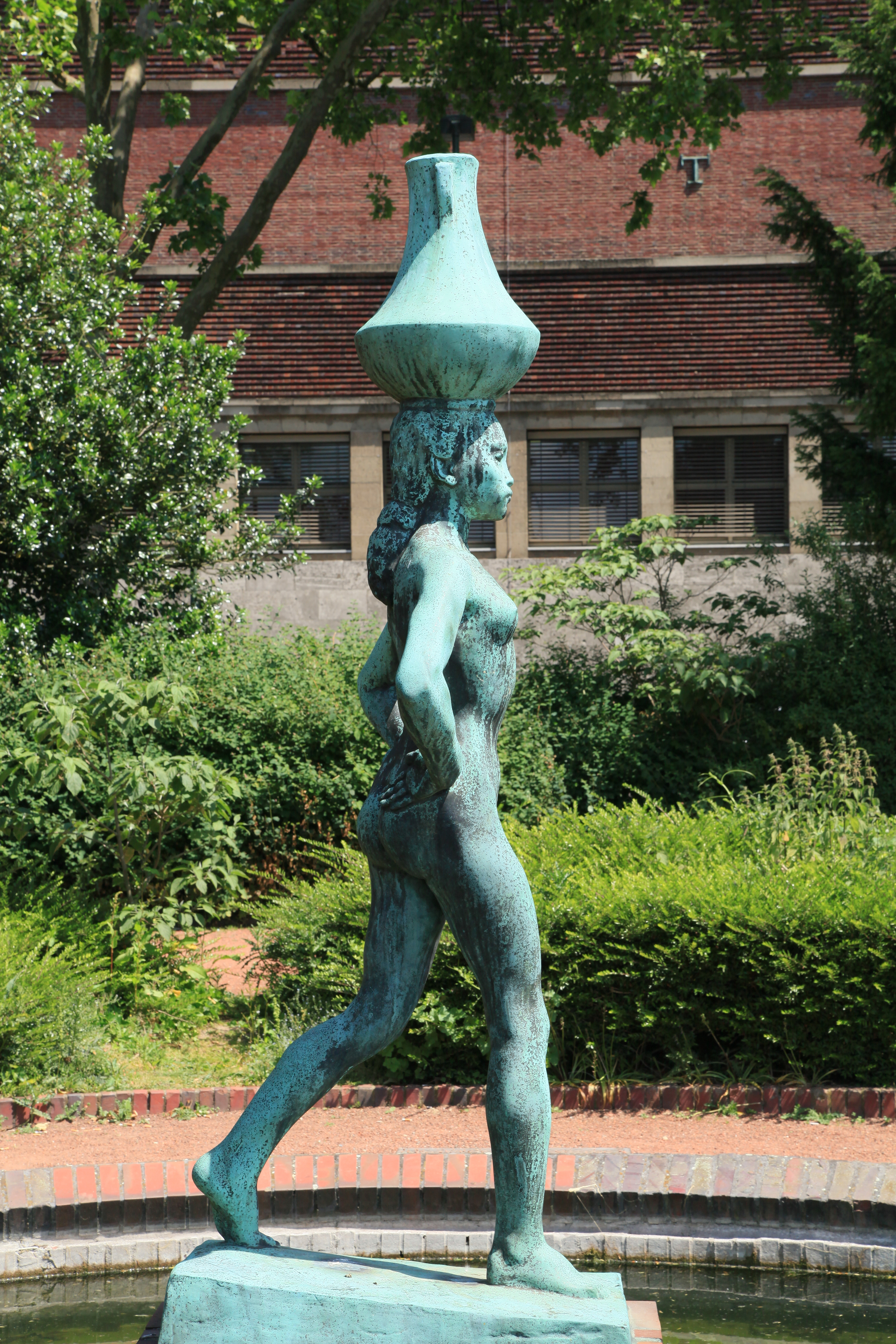 "Wasserträgering" (oder "Nubierin") von Bernhard Sopher, Rheingärtchen, Joseph-Beuys-Ufer in Düsseldorf